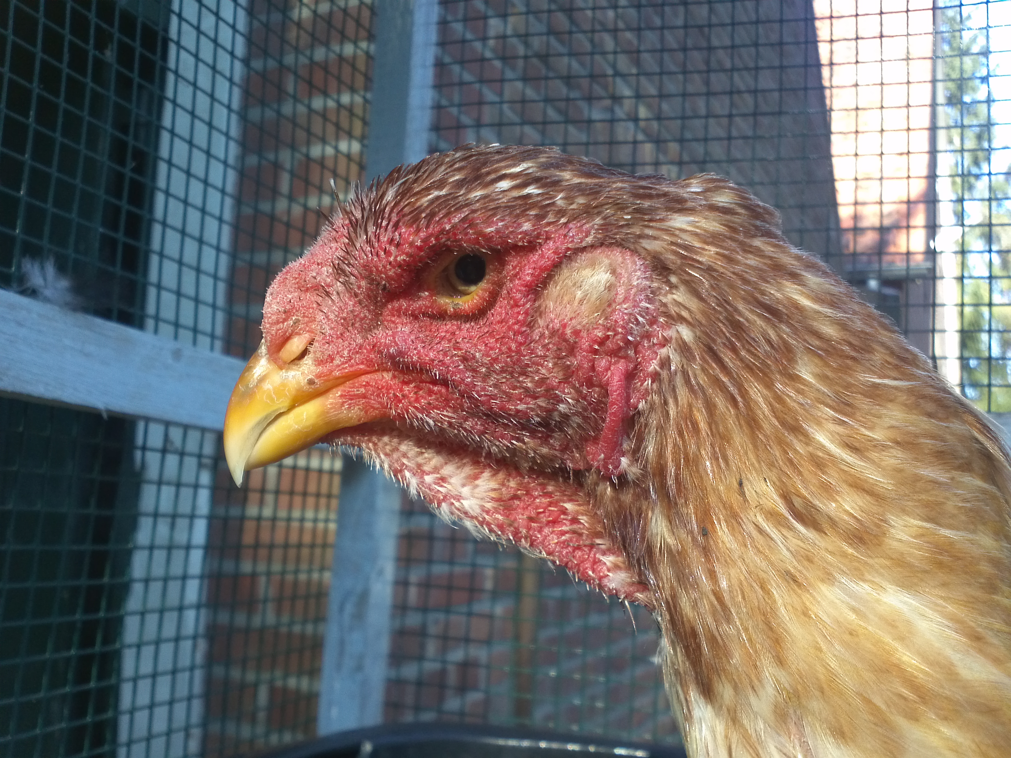 Kopstudie Maleier hen